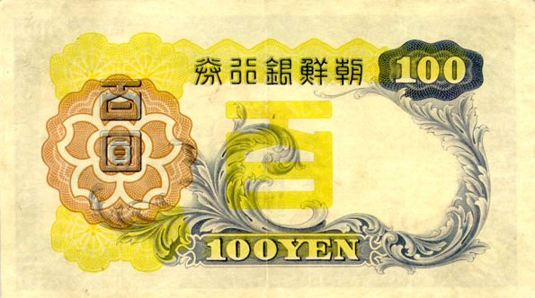 100 yen coreanos